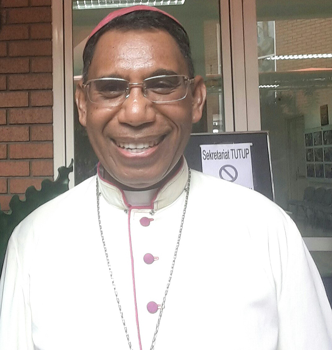 Mgr Dominikus Saku, Uskup Atambua